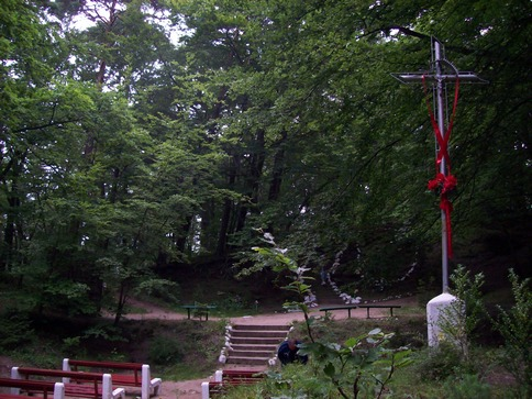 Lasy Chylońskie w Gdyni. Święta Góra - miejsce kultu św. Mikołaja z Miry.